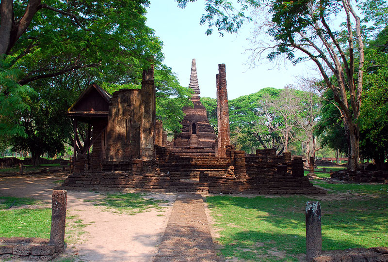 Si Satchanalai Historical Park, Sukothai, Thailand